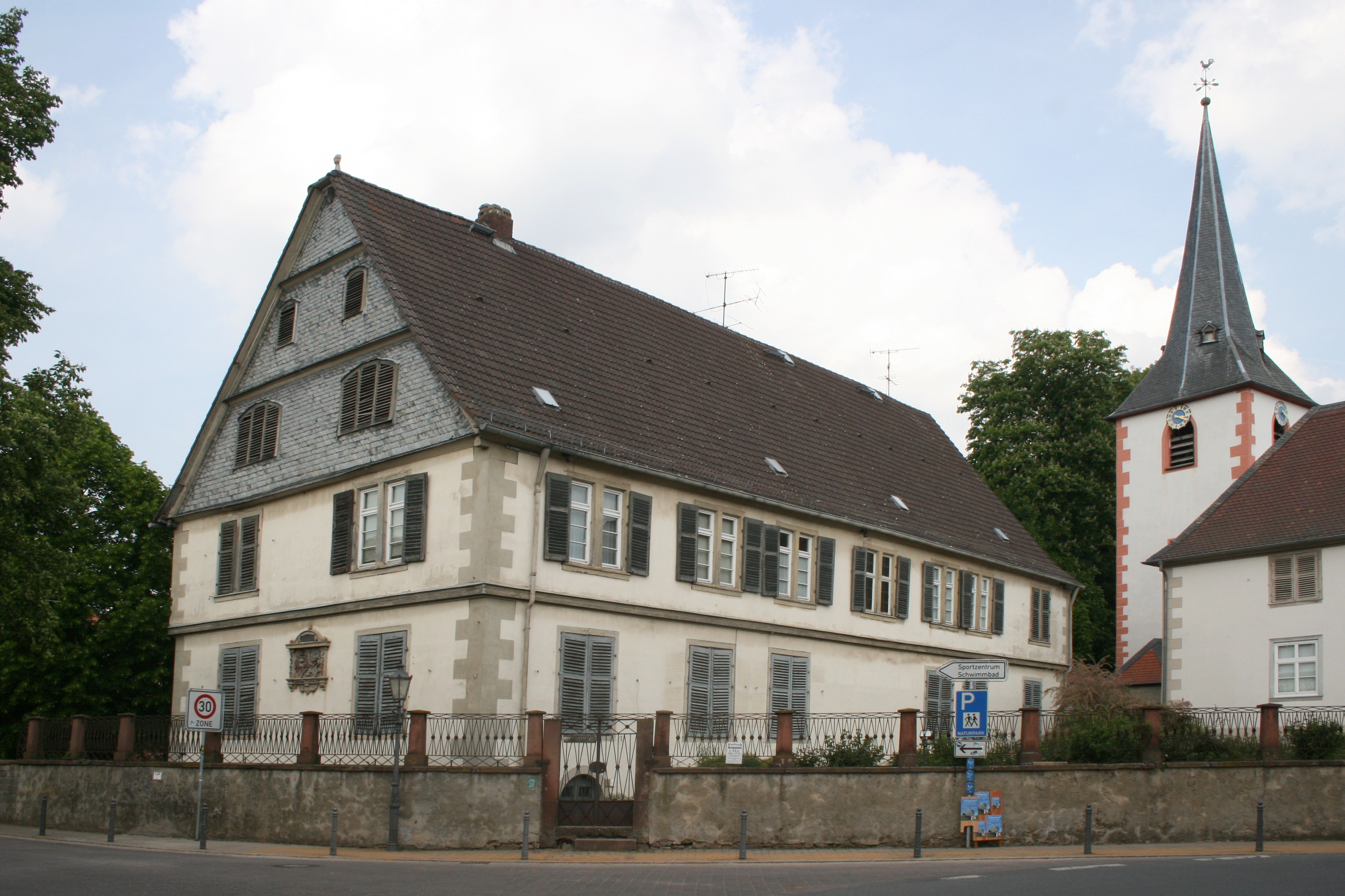 Herrenhaus der Freiherren von Gemmingen-Hornberg (ehemals Rodensteiner Hofgut) in Fränkisch-Crumbach.